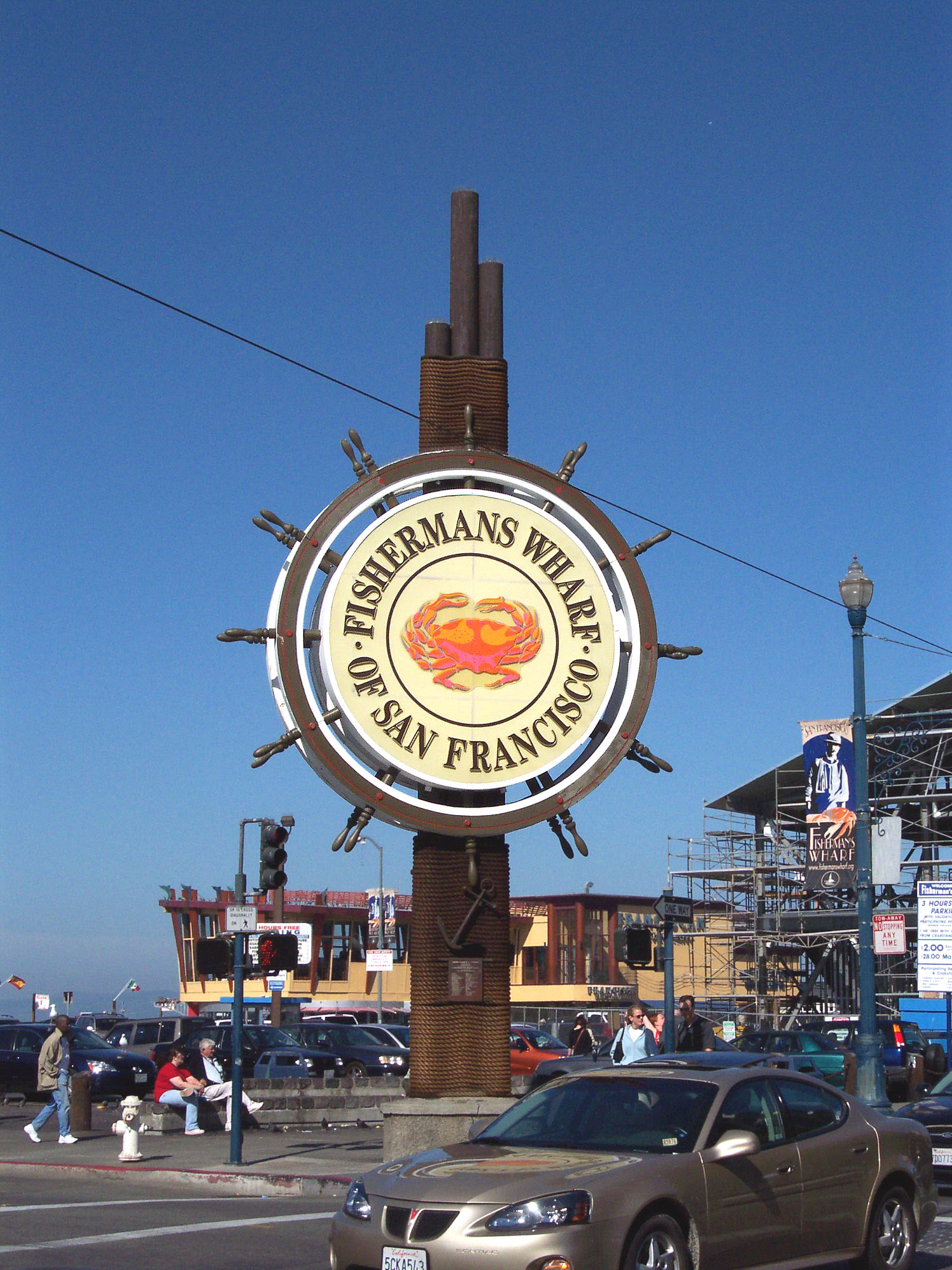 Bildaufnahme der Westseite der Fisherman's Wharf -Größe 1524x2032 Pixel; Belichtung 1/1000 Sekunde